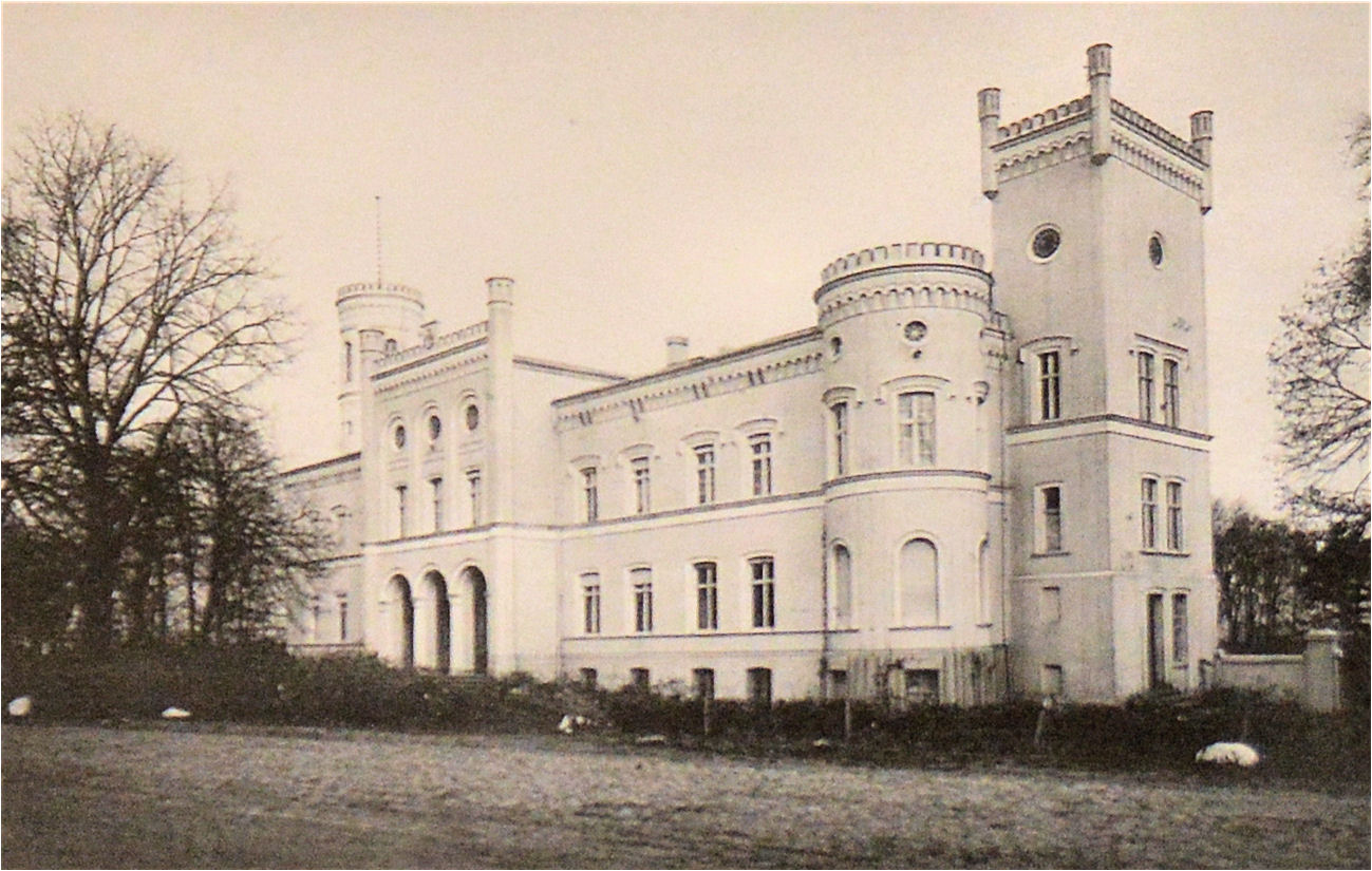 Pałac w Bezrzeczu koło Szczecina (obiekt obecnie nie istnieje).